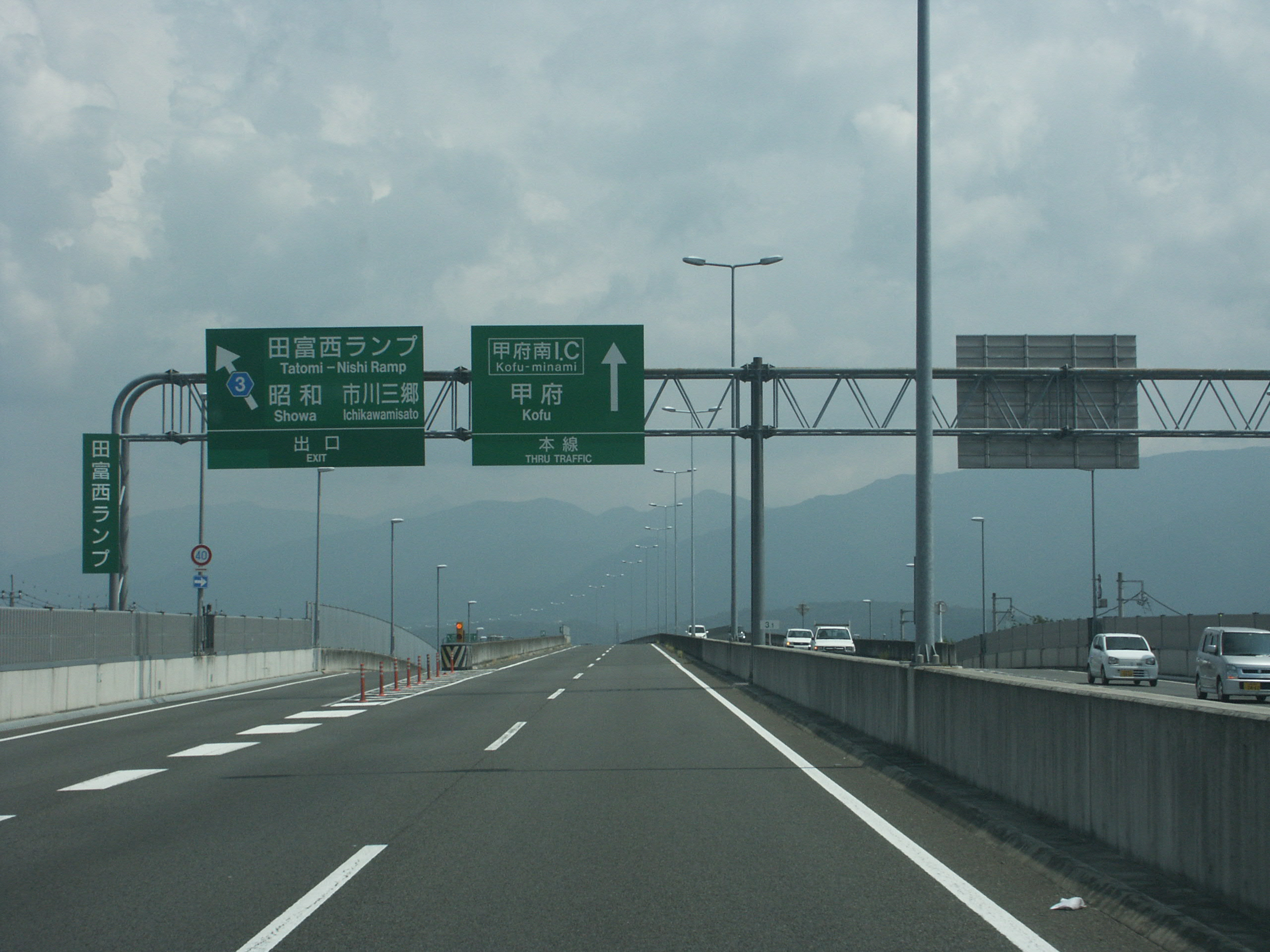 新山梨環状道路田富西ランプ出口付近